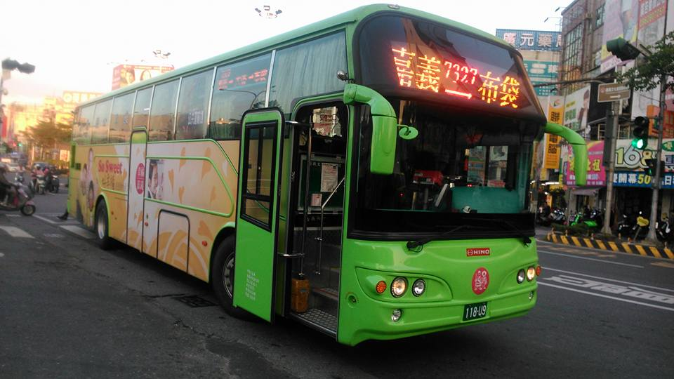 中文（台灣）: 嘉義縣公共汽車管理處日野大客車118-U9。